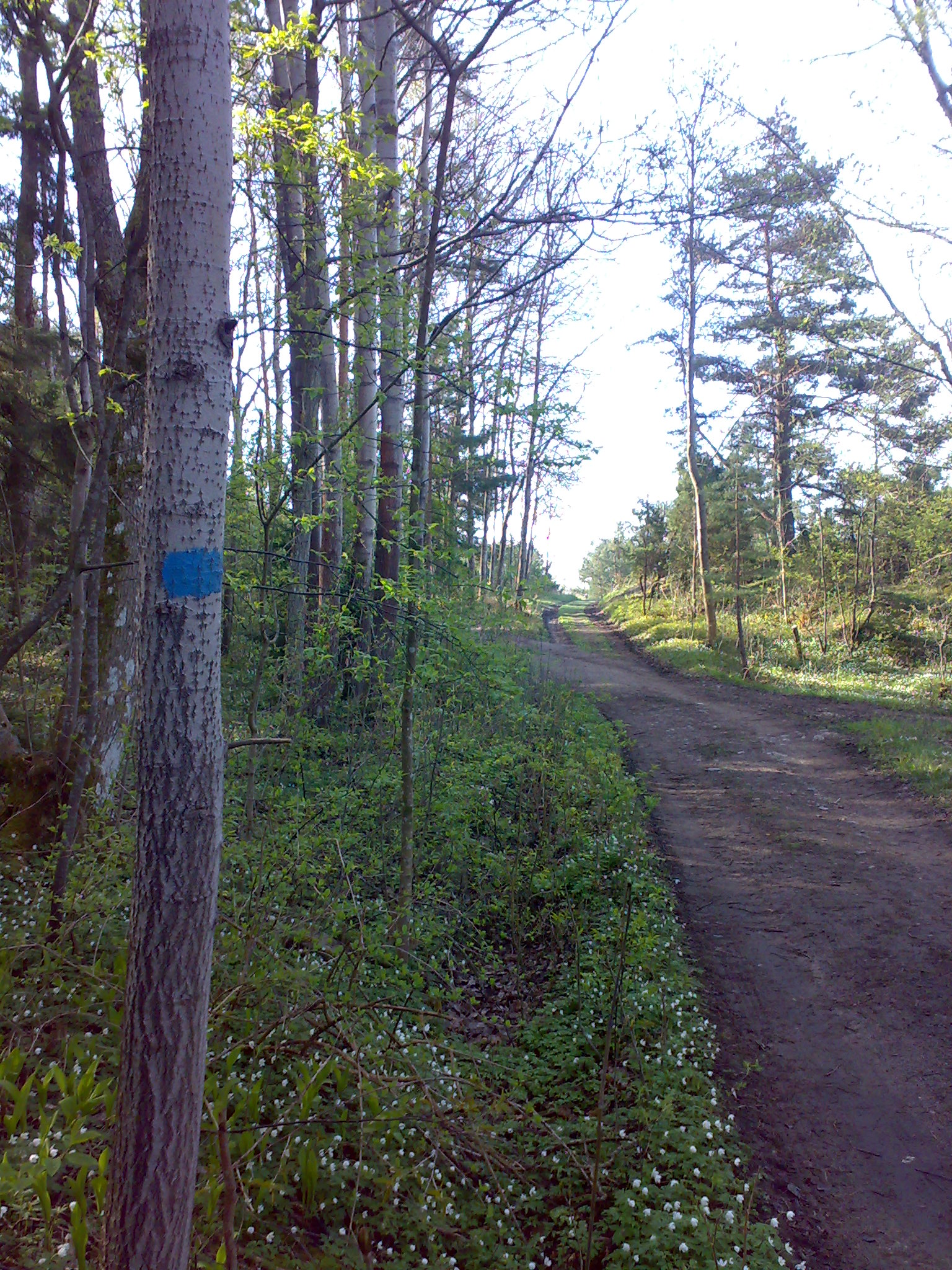 Kyststien i Hurum